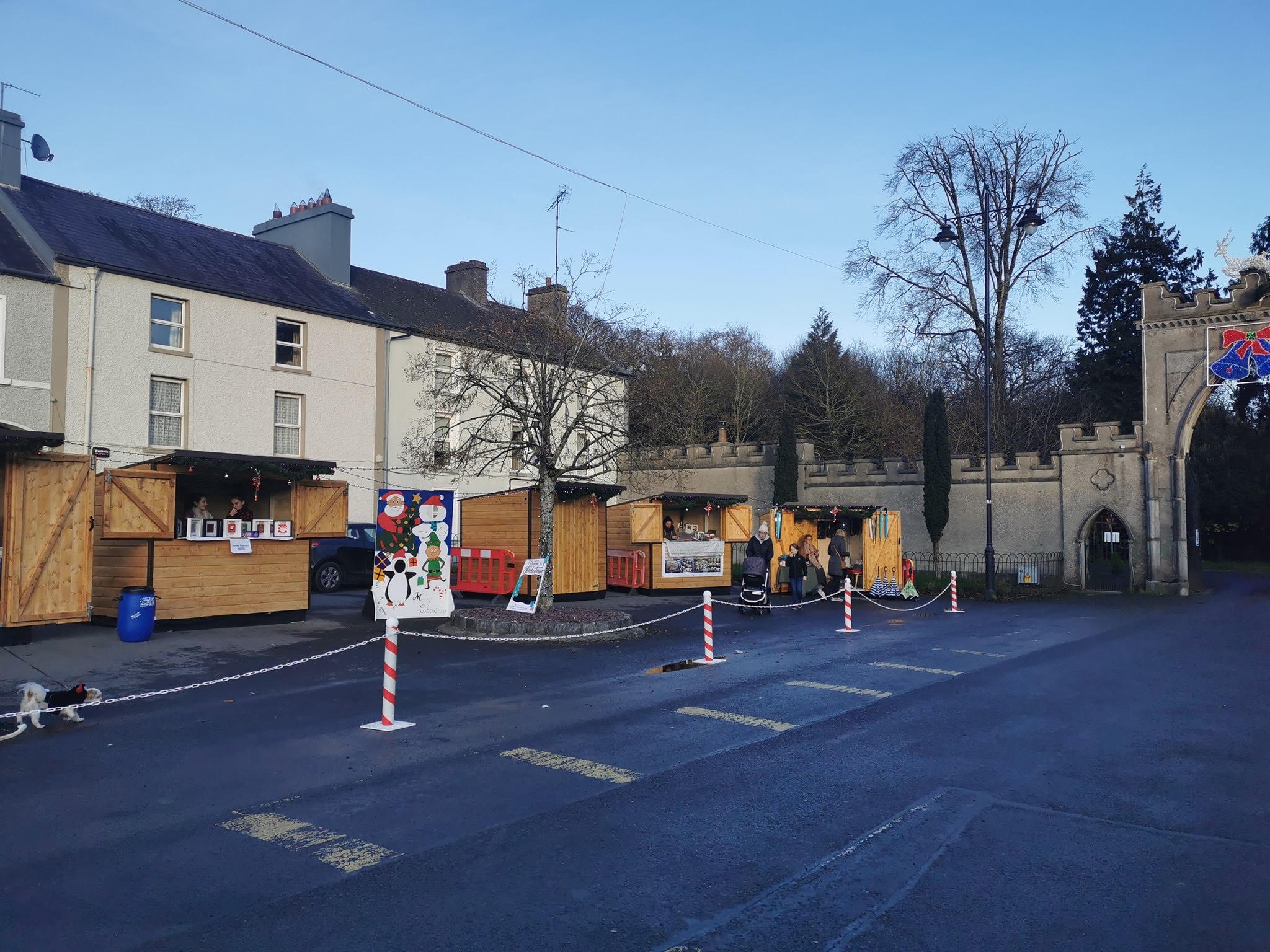 Margadh